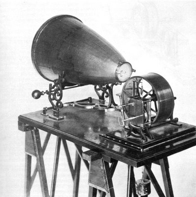 Es una foto de un fonoautografo, tomada de su perte de atras.